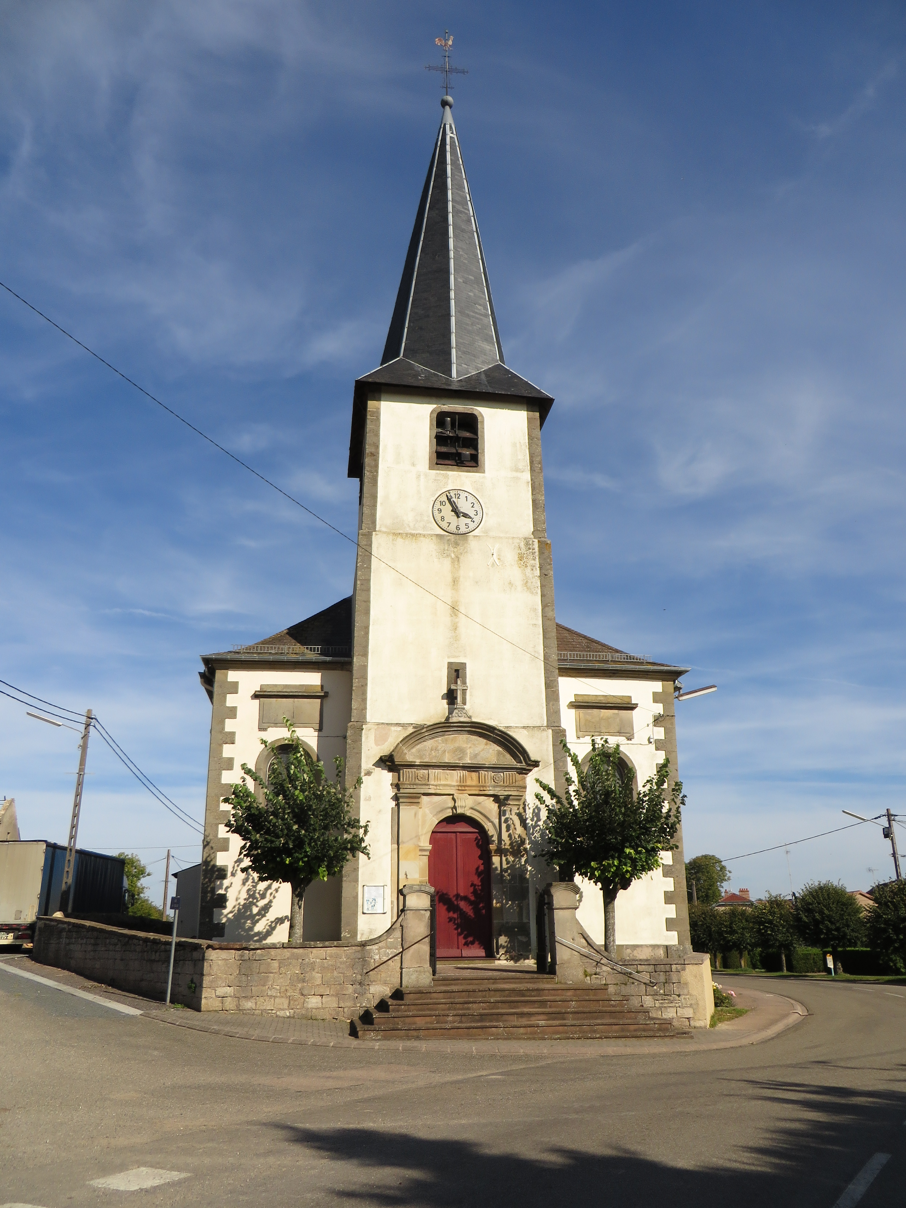 Lagarde eglise